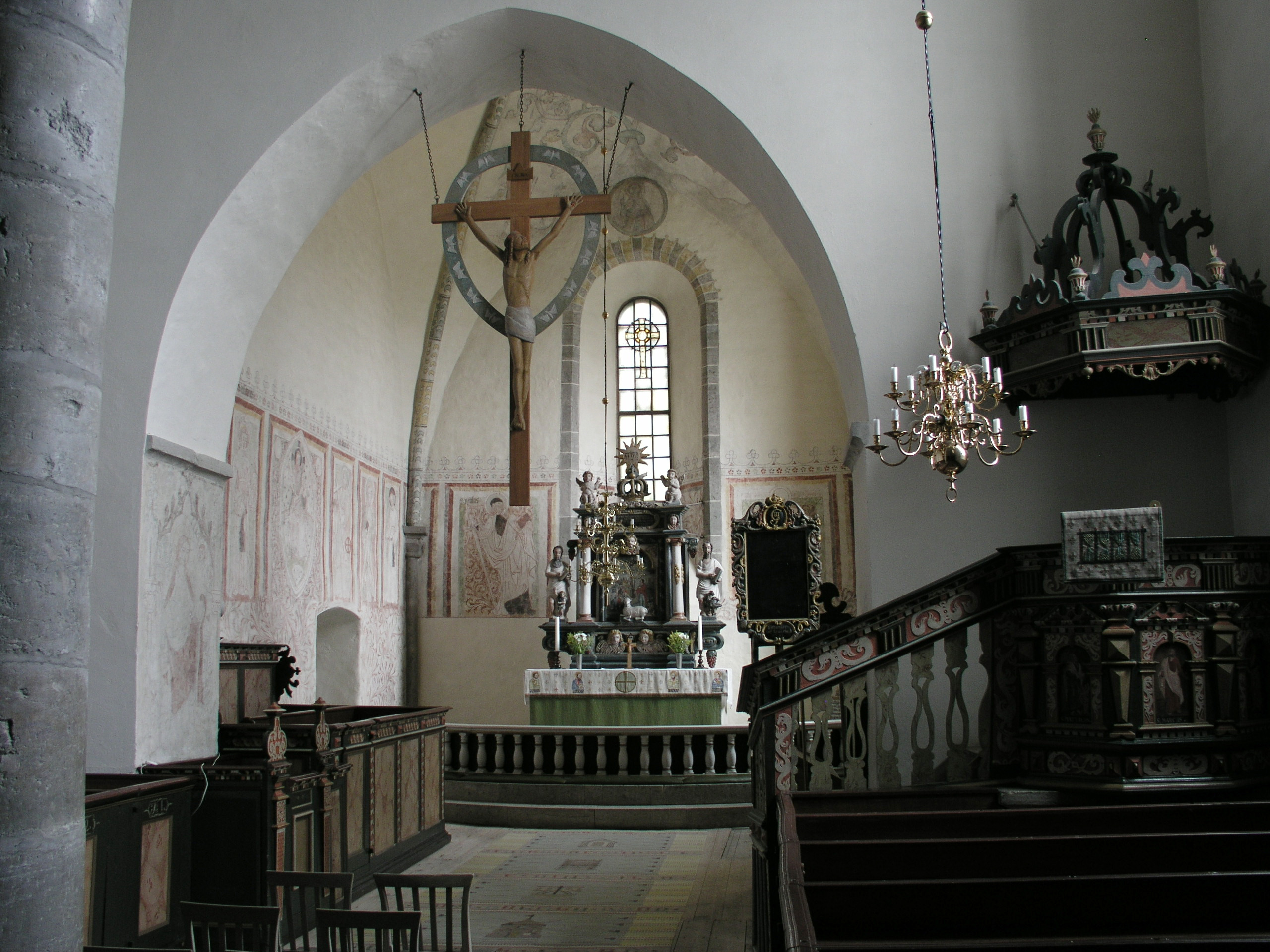 Othem kyrka / Othem church, Gotland, Sweden. Nave.